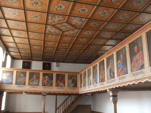 Nikolauskirche Temmenhausen, Dornstadt, Alb-Donau-Kreis Empore mit barocker Apostelgalerie